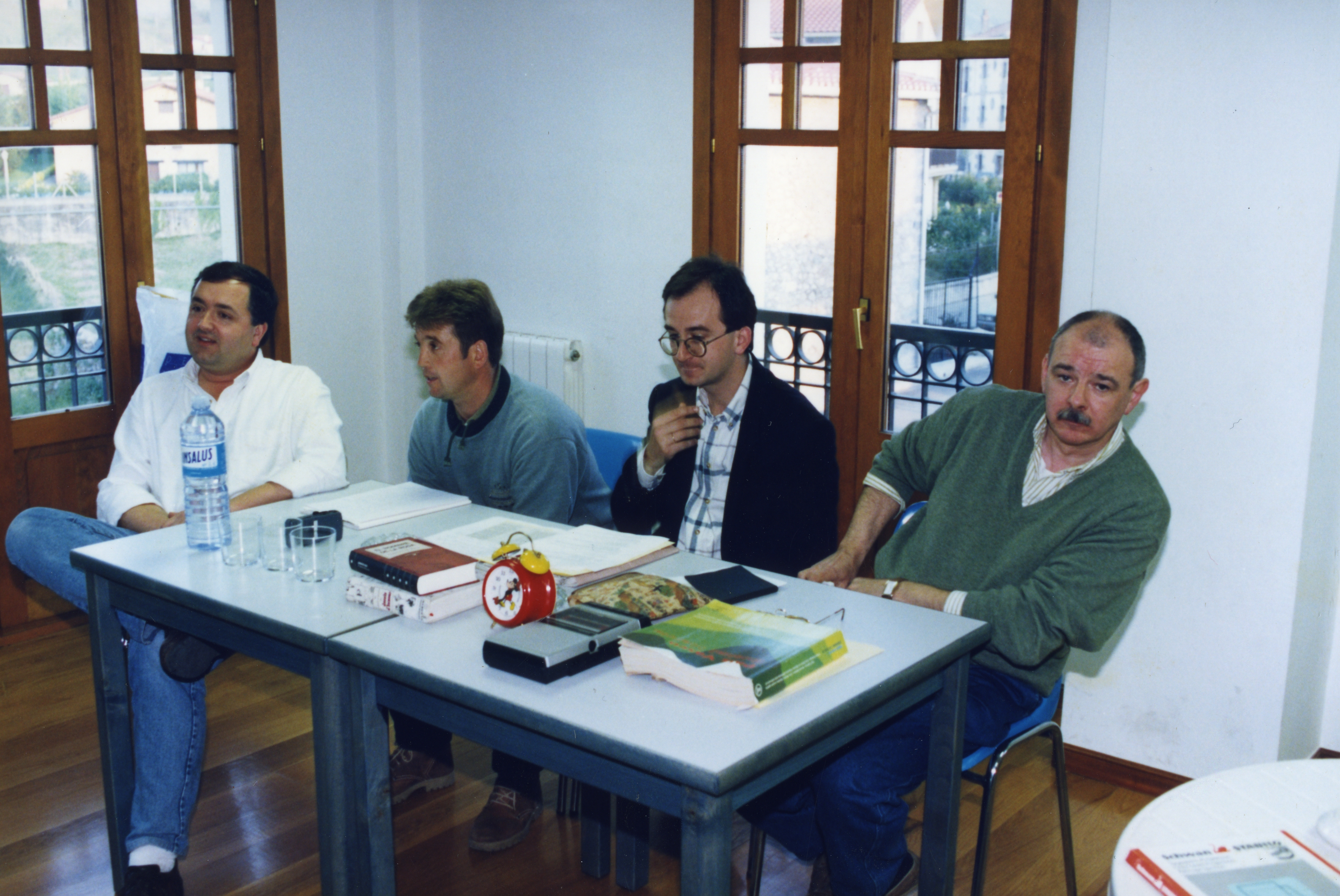 San Millan guraso elkarteak antolatuta. Aiurri 14 zbk. 13. orr.